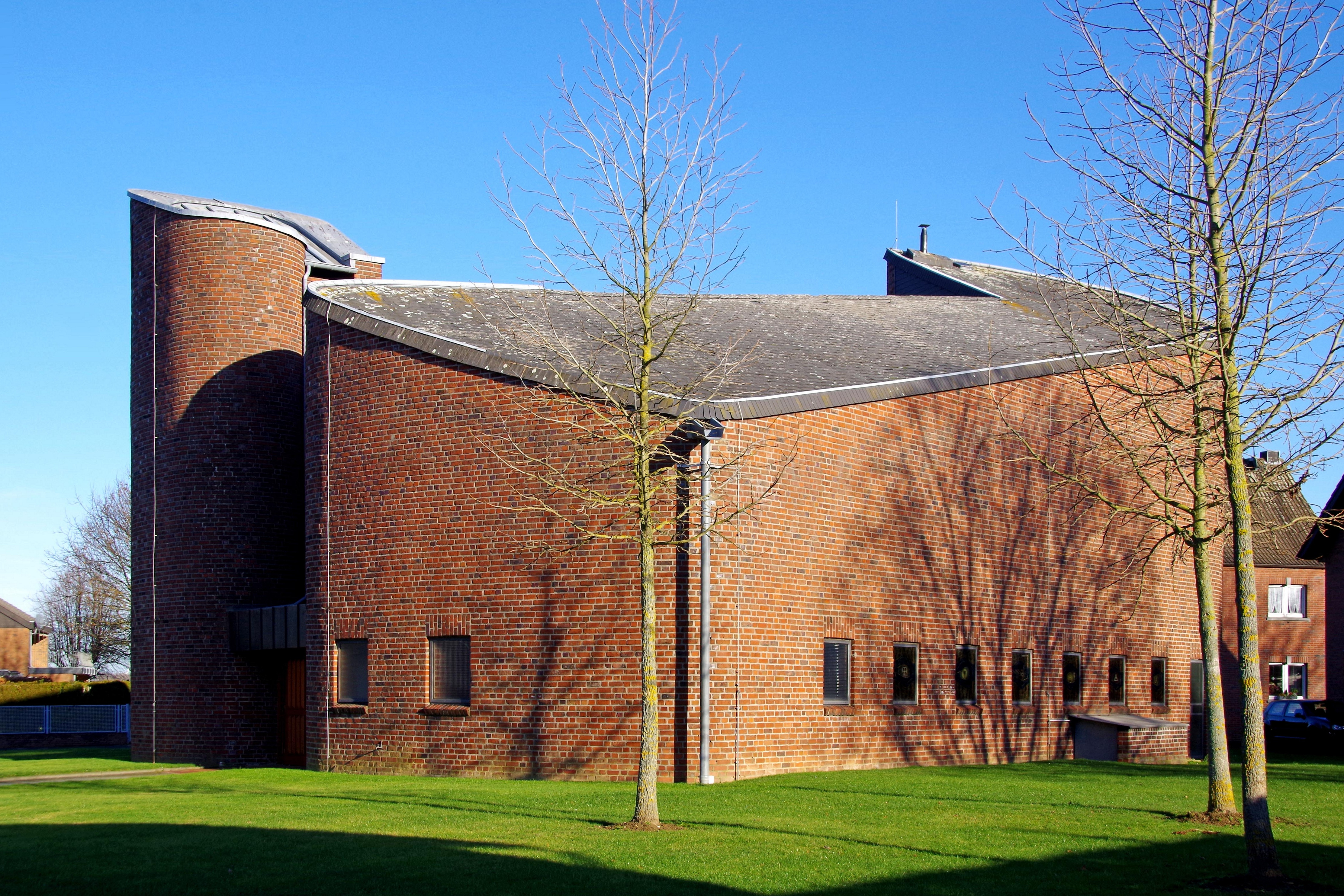 St. Wendelinus (Bettendorf)